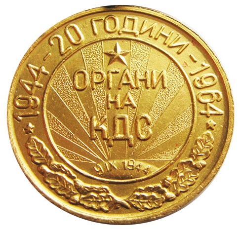 Медал 20г. Органи на КДС 1944-1964 - 20 г.